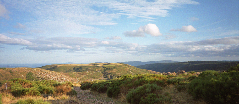 Une des nombreuses vues depuis la commune de Montselgues